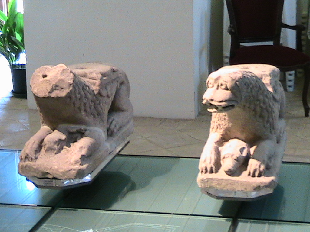 Bardone (Terenzo) - Pieve - Leoni stilofori di scuola antelamica